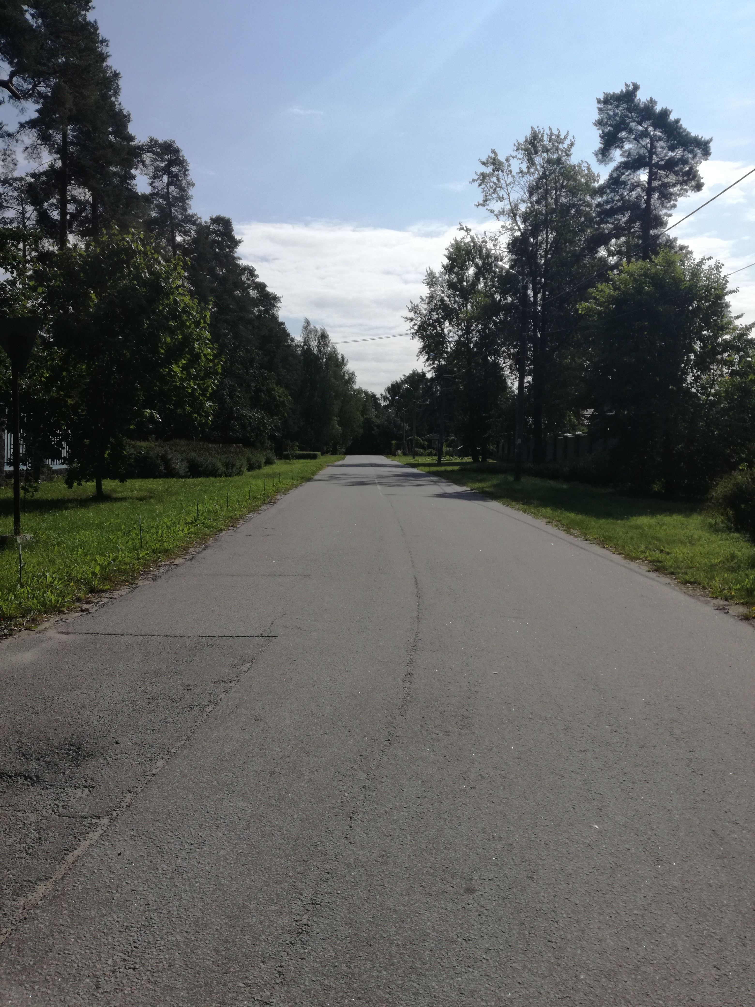 Песочная улица, Песочный